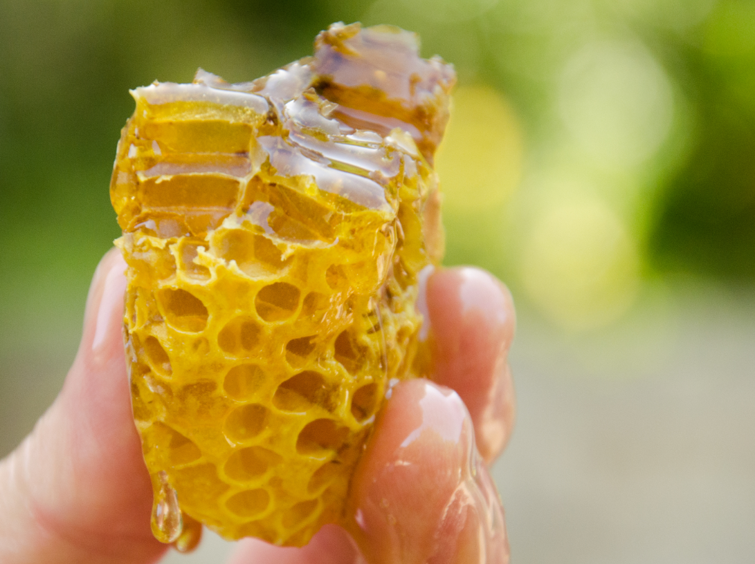 Miele della Valle dell'Anapo, immagine derivata da